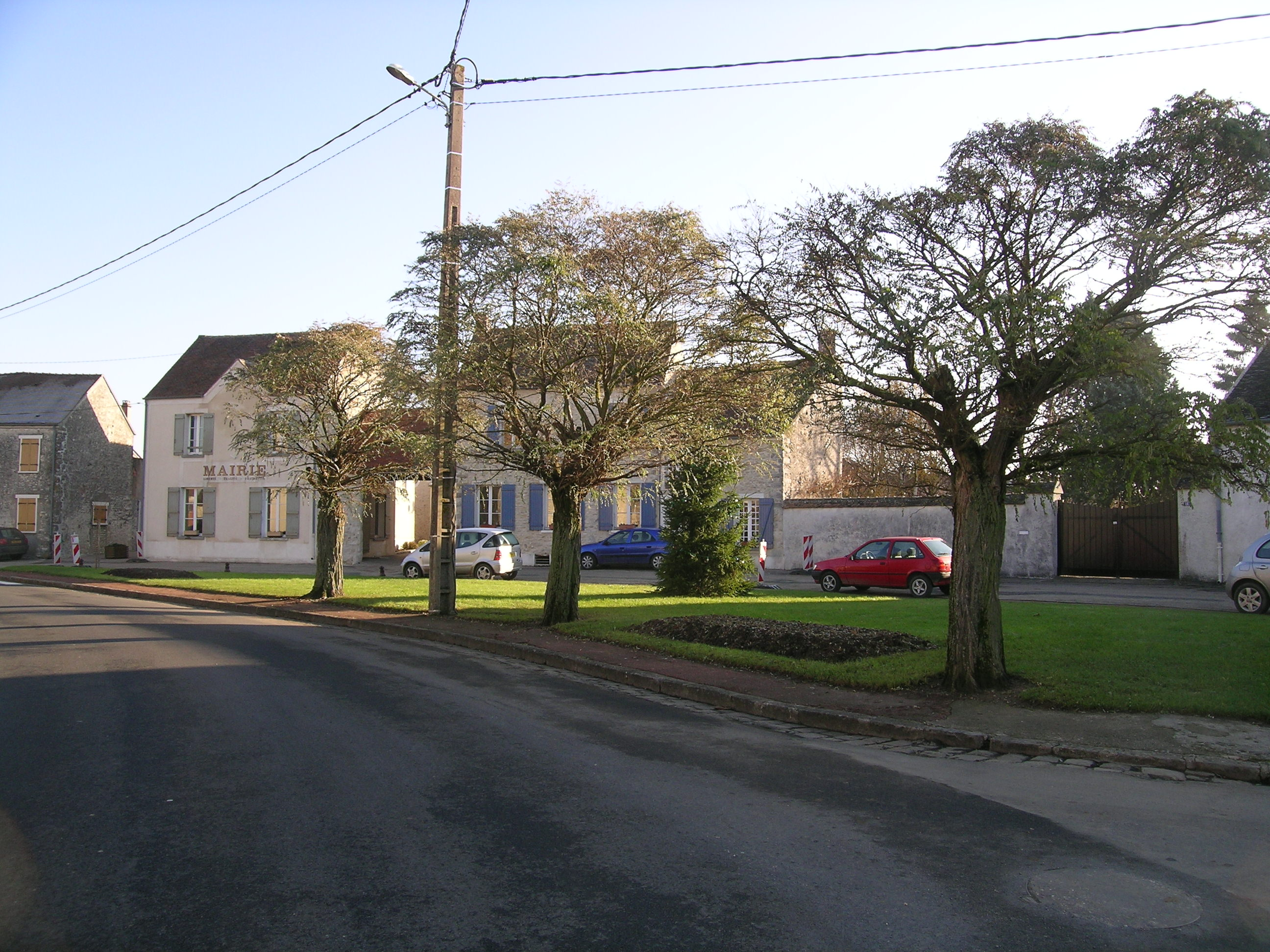 Rue d'amponville